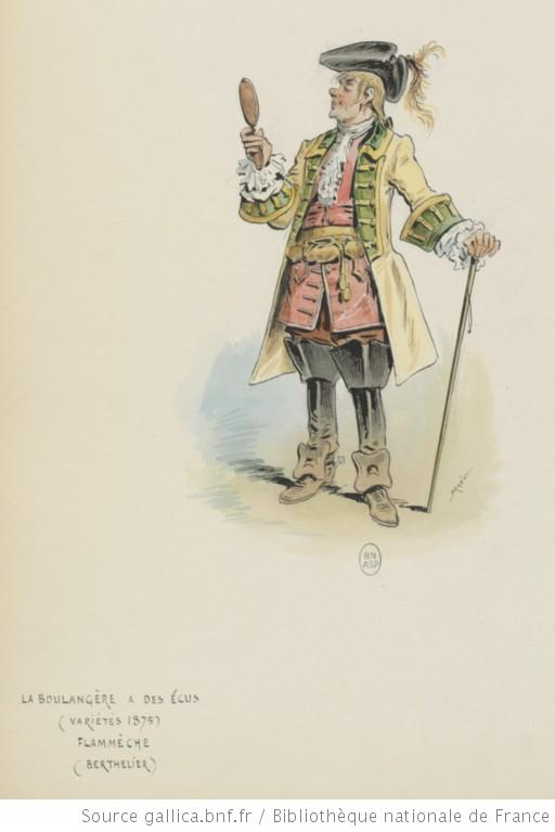 La boulangère a des écus, opéra-bouffe de Meilhac, Halévy et Offenbach : Berthelier (Flammèche) : dessin de Draner